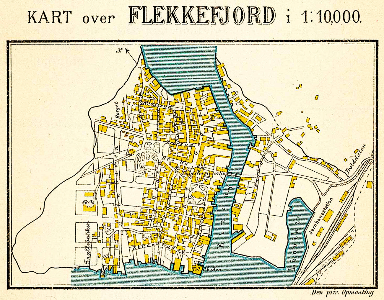 Kart over Flekkefjord, 1903.